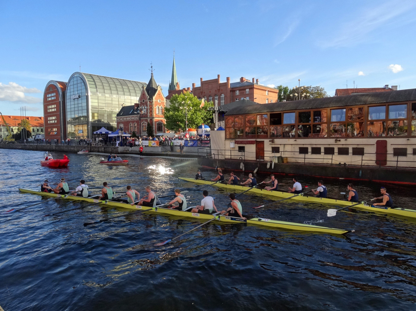 XXV Wielka Wioślarska o Puchar Brdy 2016, wyścig osad uniwersytetów Oxford i Cambridge